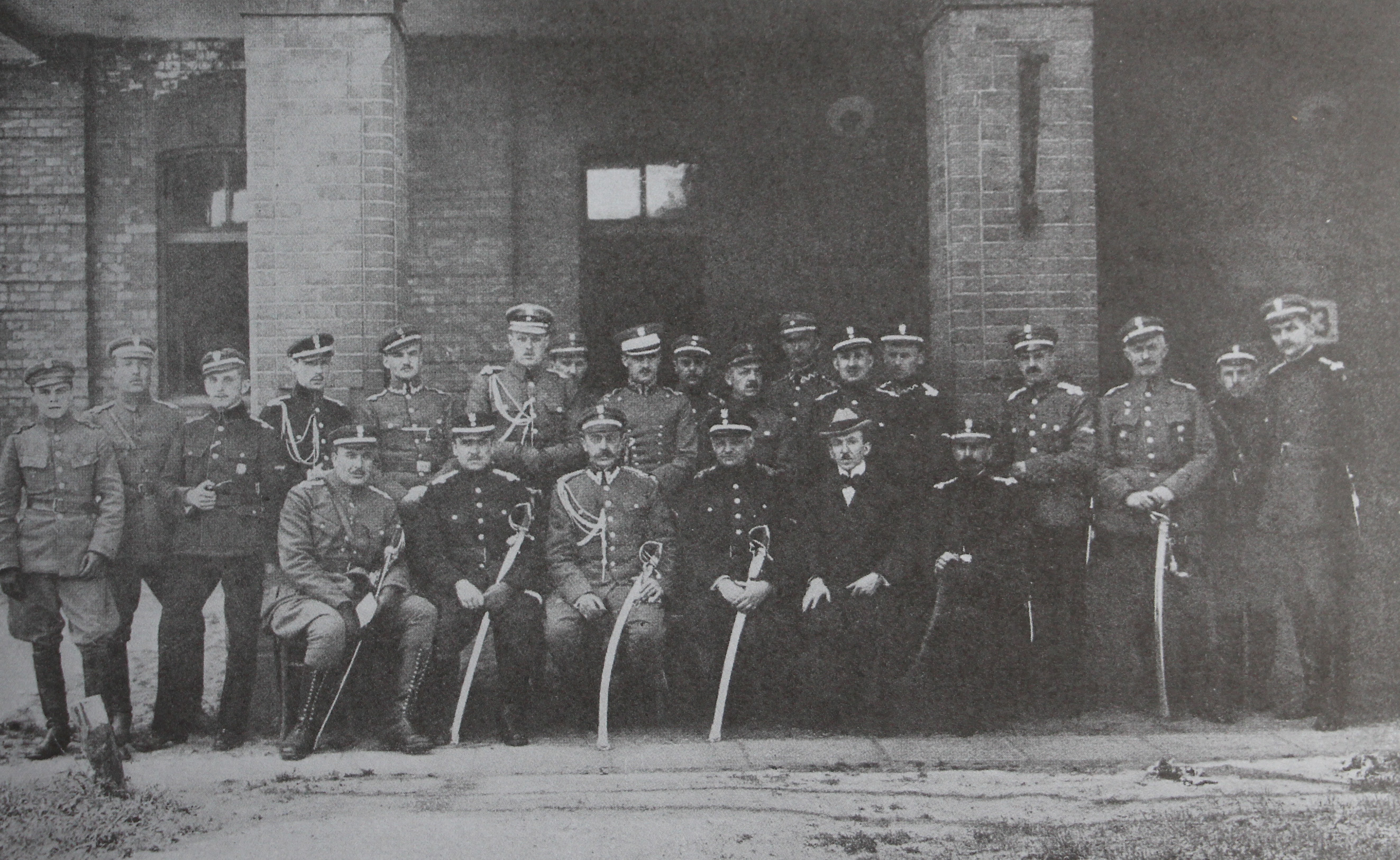 Minister Spraw Wojskowych gen. Józef Leśniewski na inspekcji I-go Lotniczego Baonu Uzupełnień. Siedzą por. Markiewicz - dowódca I-go Lotniczego Baonu Uzupełnień, mjr Malczewski, gen. Józef Leśniewski, ppłk Hipolit Łossowski, Remigiusz Kwiatkowski, X. i inni.